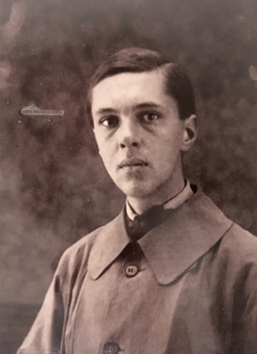 Столыпин Аркадий Петрович(1903-1990). Сын министра Столыпина П.А. Фото ~1920-е гг.